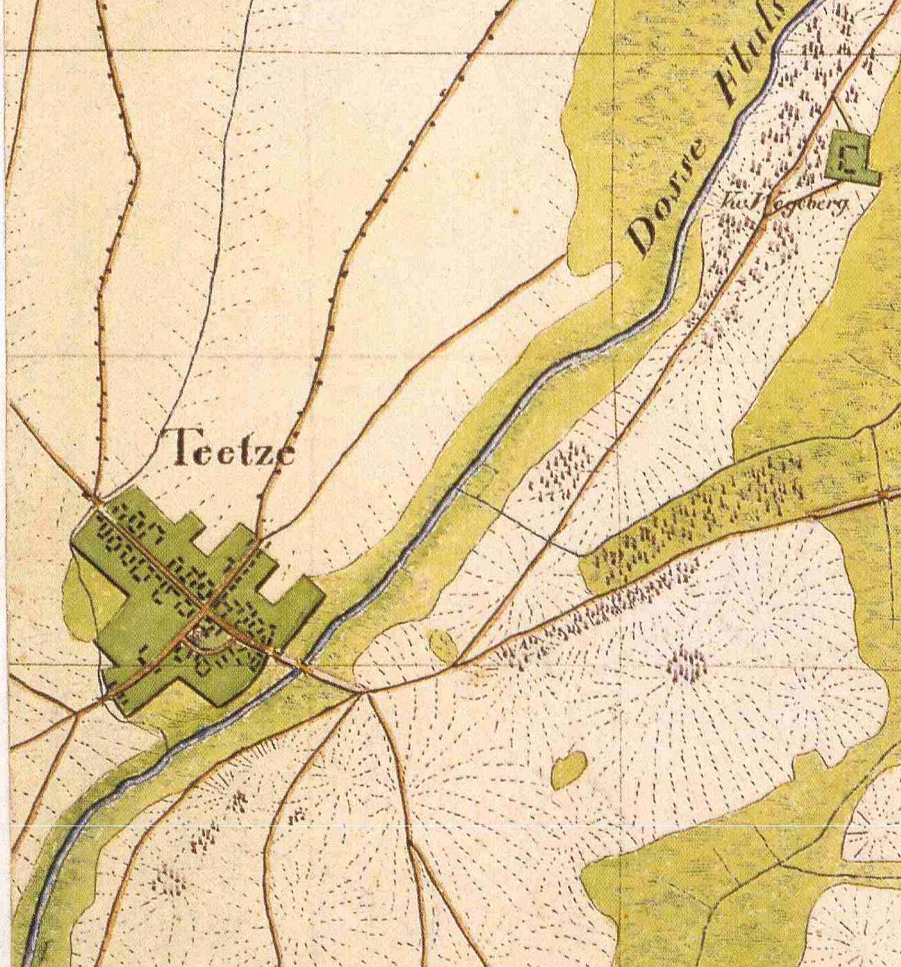 Teetz, Wohnplatz der Stadt Kyritz, Landkreis Prignitz-Ruppin, Brandenburg, Ausschnitt aus dem Urmesstischblatt 2941 Räglin von 1825